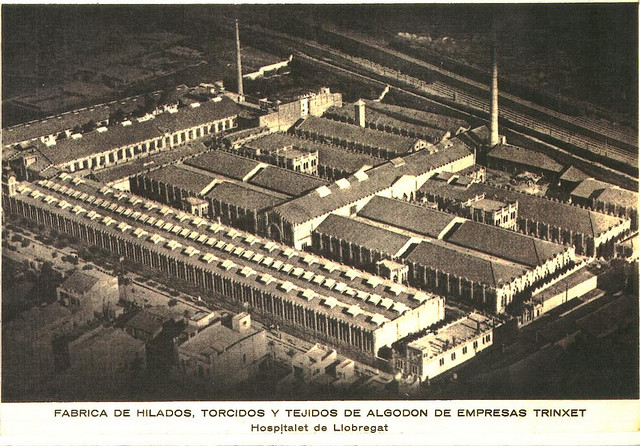 Imatge de la fàbrica tèxtil "Can Trinxet" a l'Hospitalet de Llobregat (Catalunya), obra de Joan Alsina i Arús (1907). La fàbrica va ser propietat d'Avel·li Trinxet, propietari de la Casa Trinxet (Barcelona, 1904) obra de Puig i Cadafalch enderrocada l'any 1965. Actualment l'espai de la fàbrica ha estat recuperat per a altres serveis residencials i d'equipaments, mantenint-se una part de la construcció modernista.